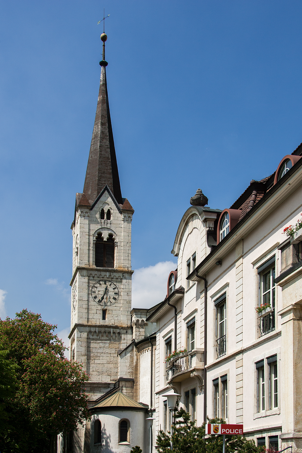 Kirche von Moutier